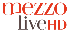 Logo de Mezzo Live HD